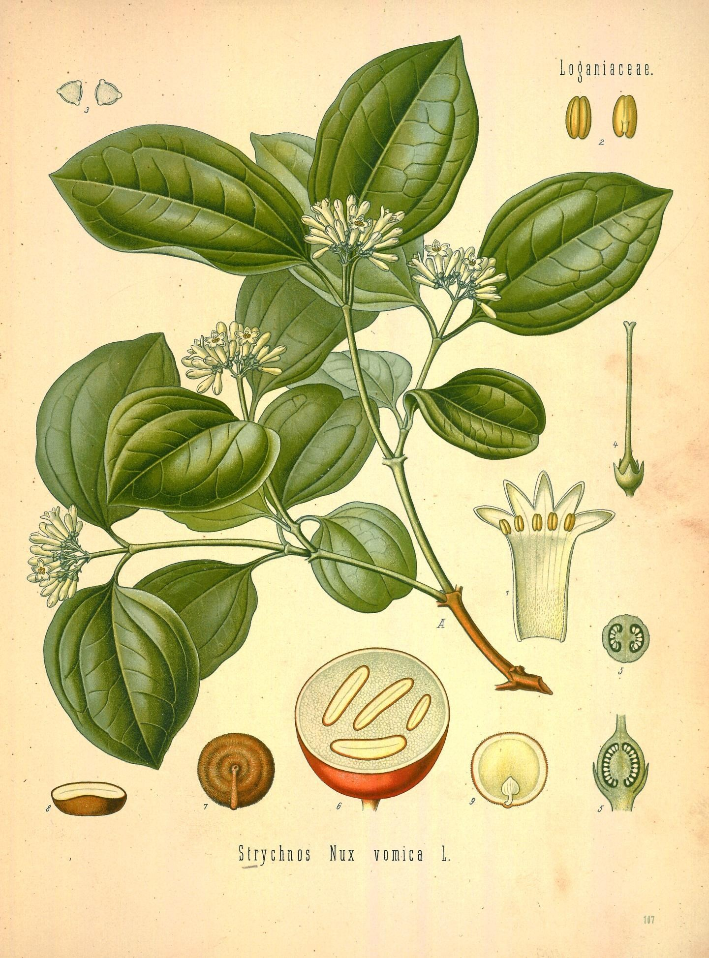 tojaniaceae. o Strycimos Nux vomica I.